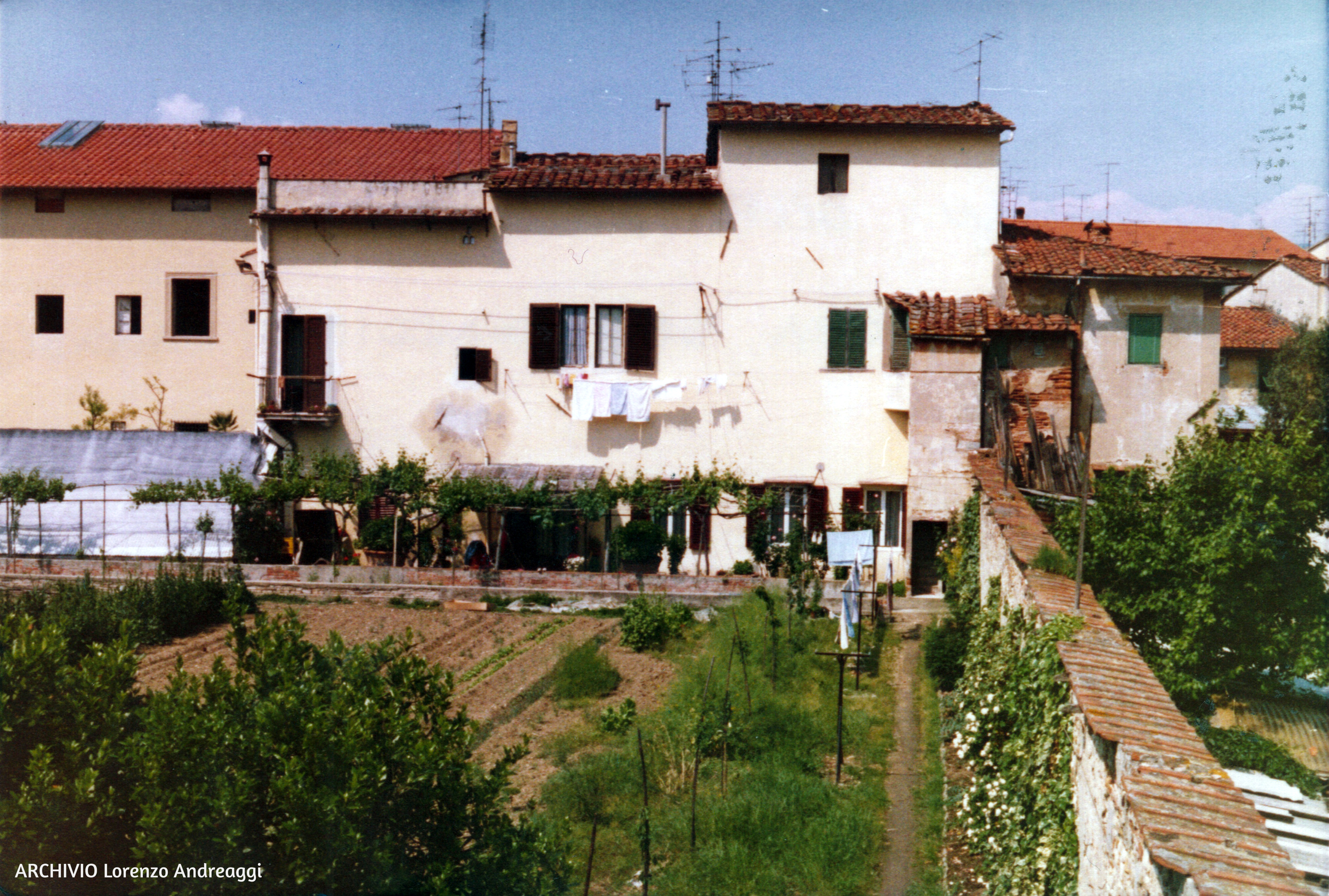 Retro della Villa del Bandino